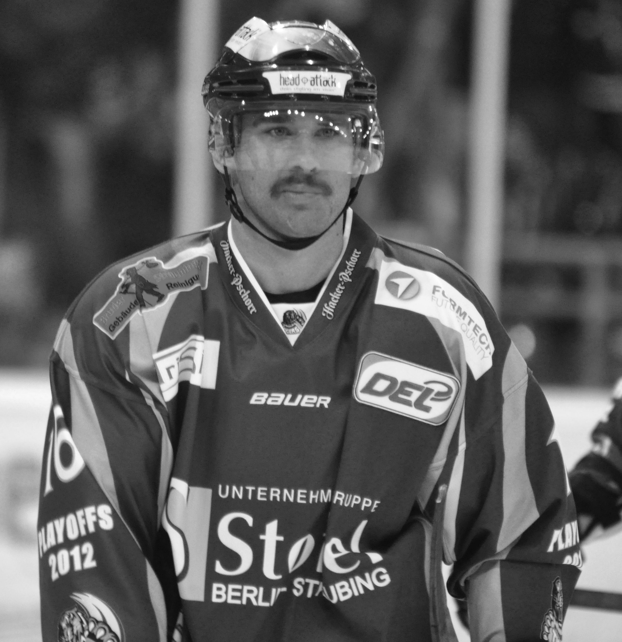 Straubing Tigers - Eisbären Berlin 11.04.2012 DEL PlayOff Halbfinale